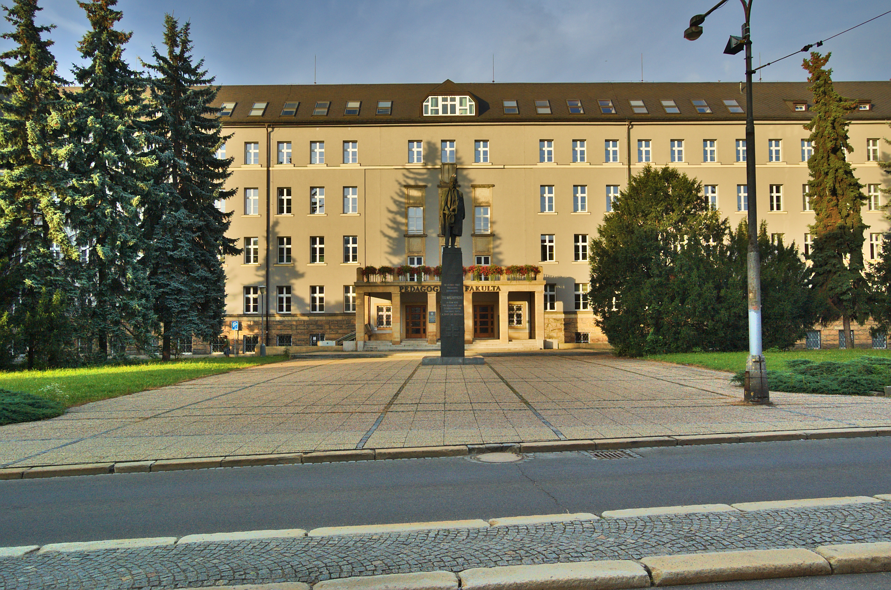 Pedagogická fakulta, Olomouc